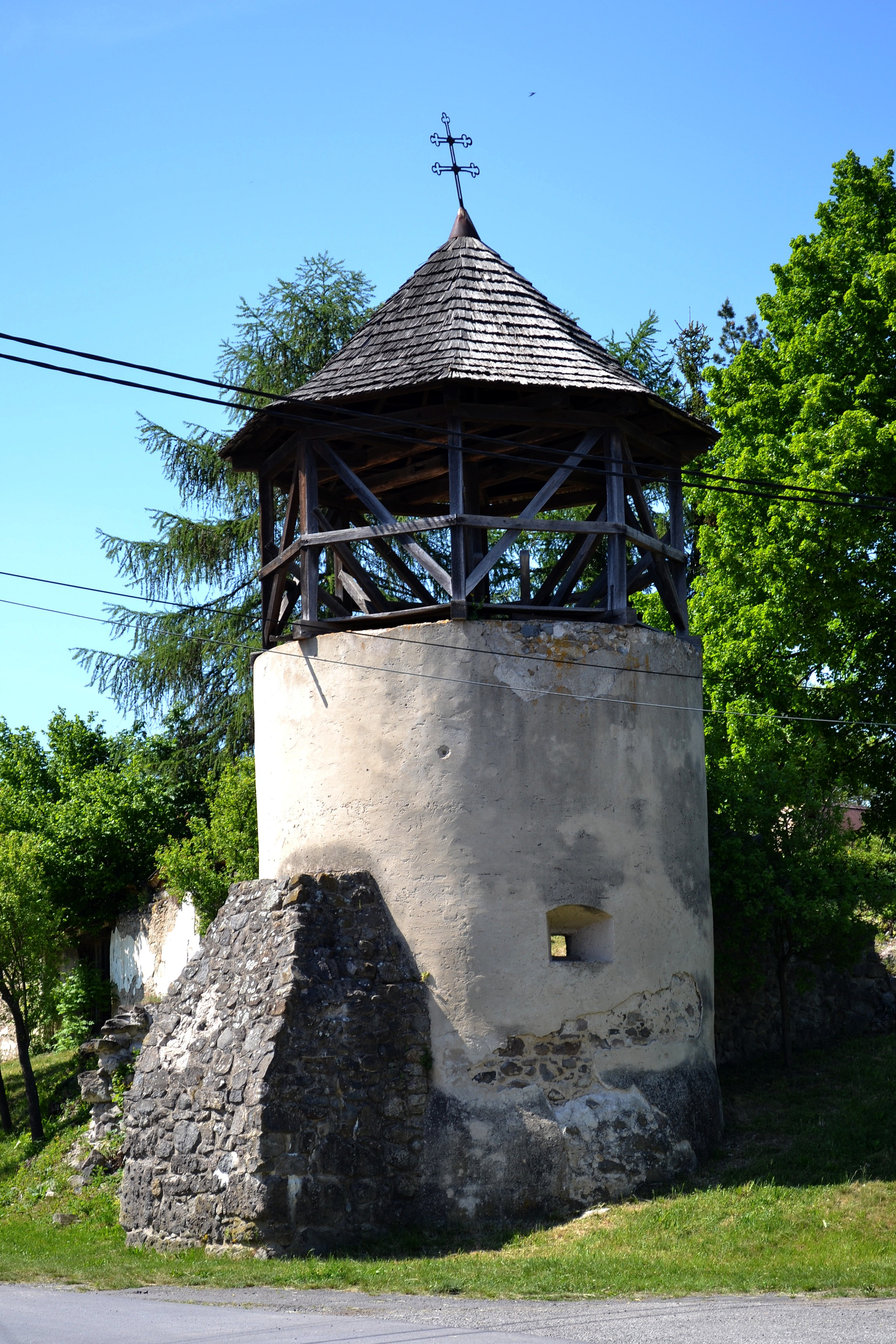 V strede obce stojí malá zvonička (bašta), postavená v r. 1586, ktorá je pozostatkom bývalého zámočka s kostolom a slúžila ako strážna a obranná veža v období tureckých nájazdov